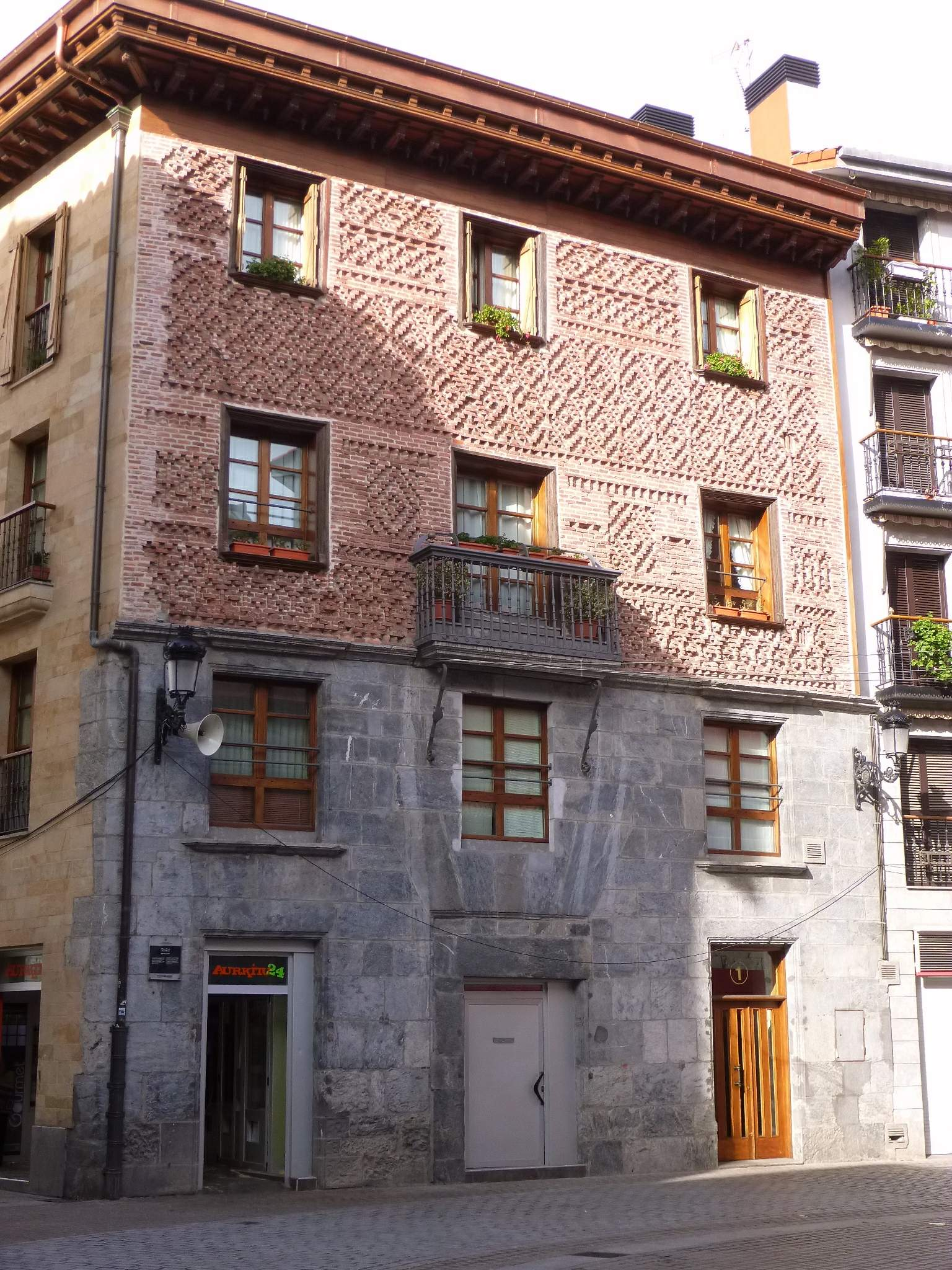 Altuna Etxea (Azpeitia)